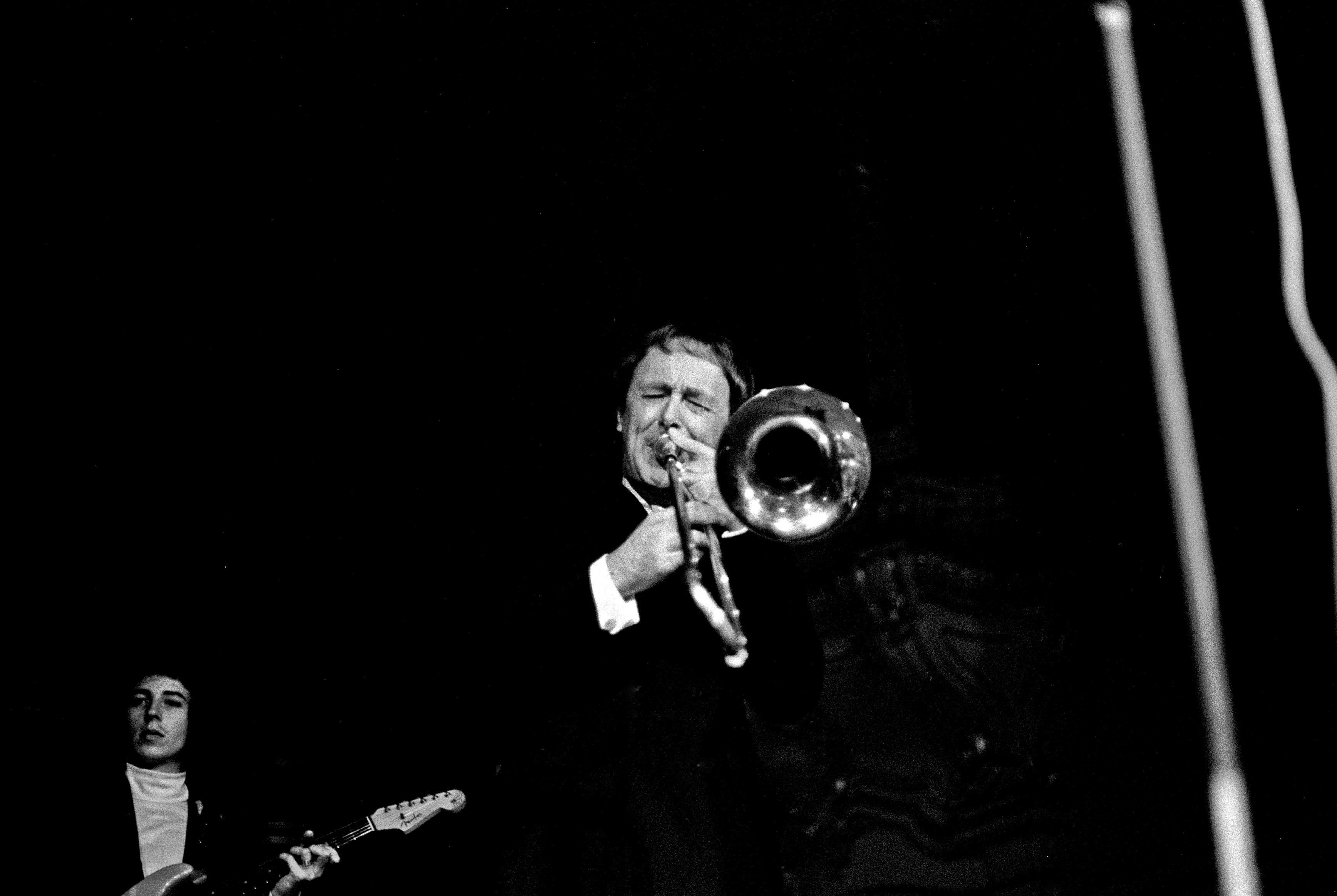 Chris Barber und Band Live in Hamburg, Musikhalle, 1972